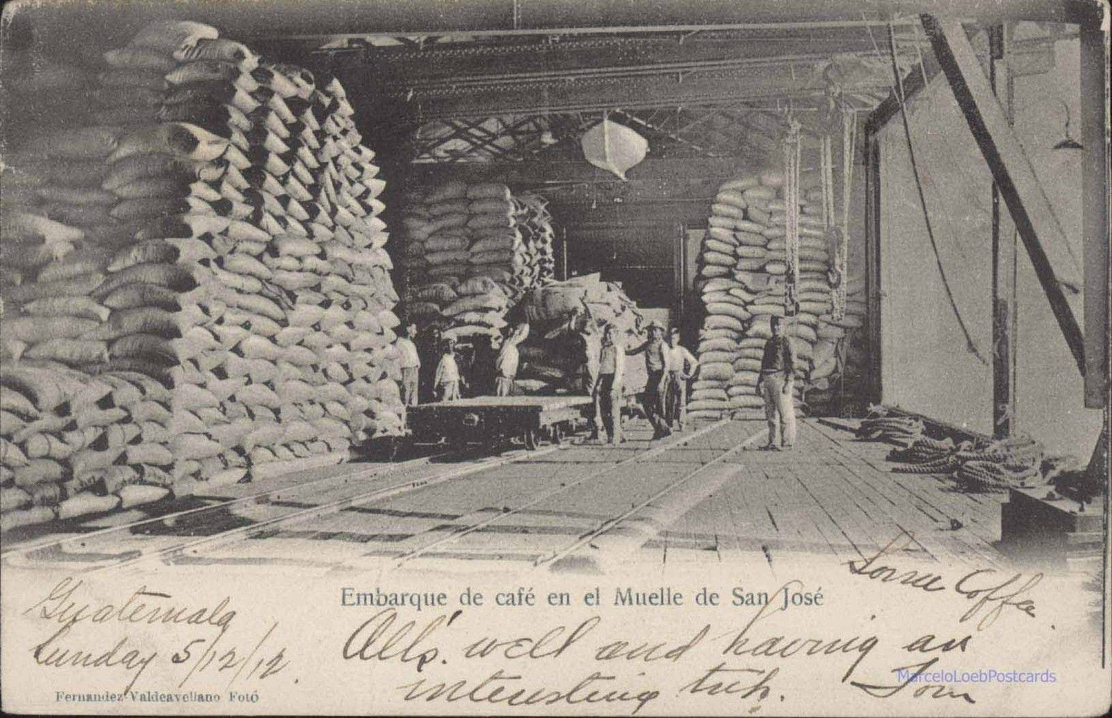 Bodega de café en Puerto de San José, Guatemala en 1912..